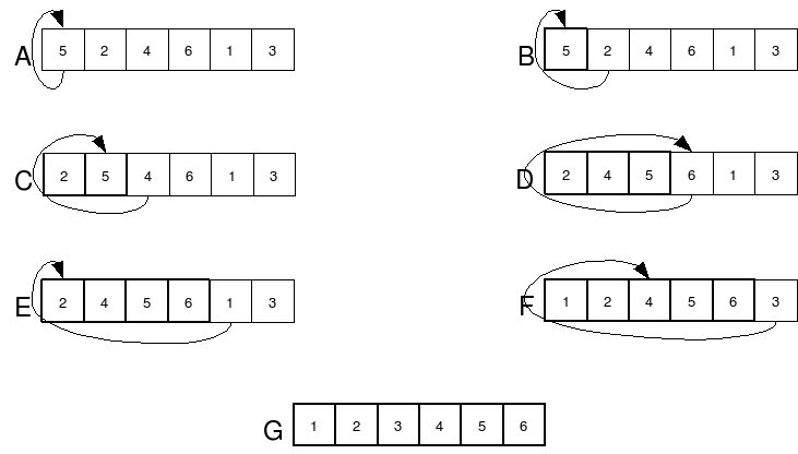 insertion sort steps